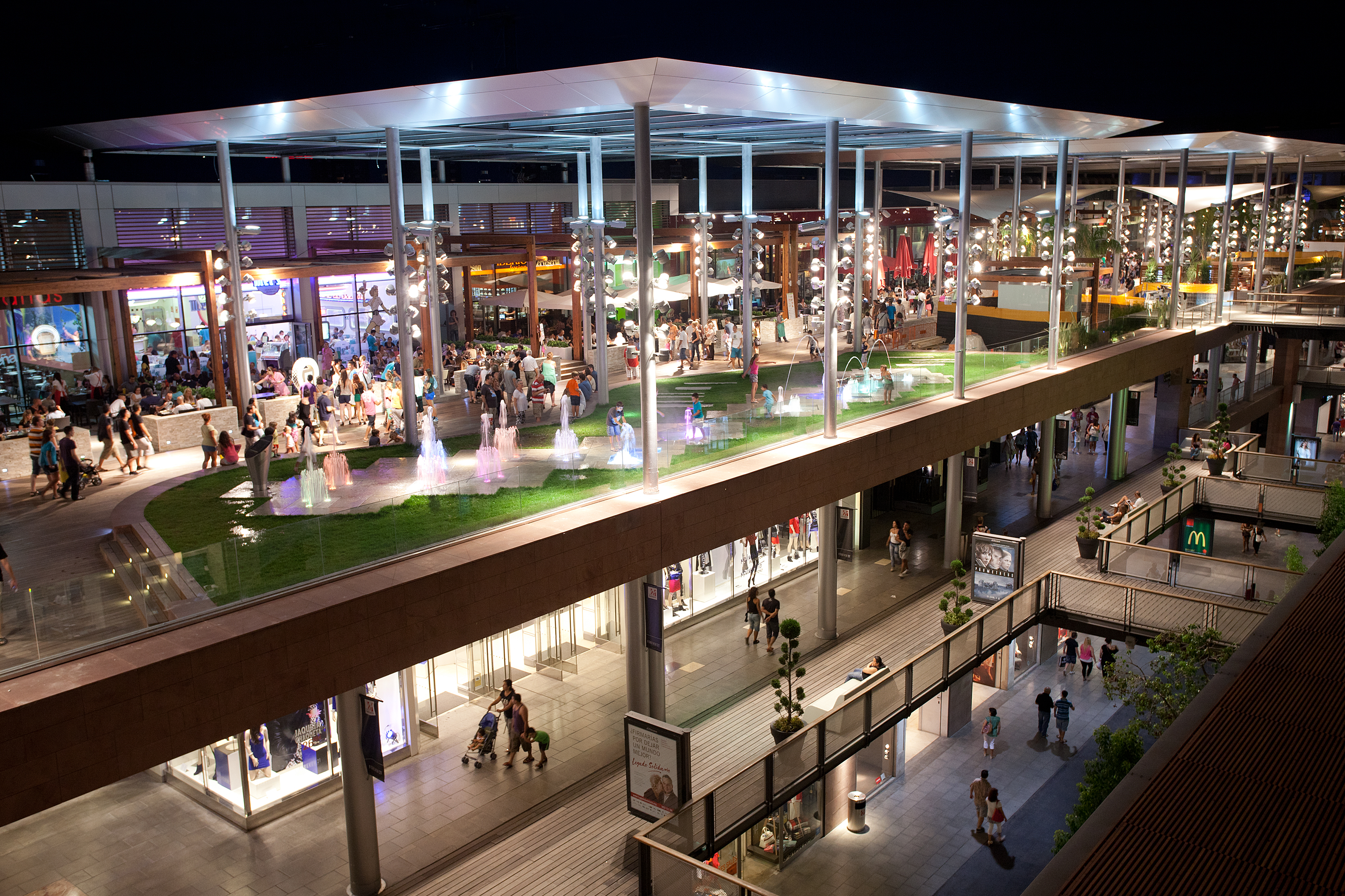 El Centro Comercial La Maquinista es un Centro Comercial abierto. Estructurado como un oasis de deseos en plena zona urbana que concentran moda, ocio, restauración y alimentación, es el centro comercial más grande de Catalunya. Cuenta con una superficie construida que supera los 250.000 m2. De ellos, 90.000 m2 están destinados al comercio y al ocio. El resto se reparten entre las amplias zonas para los visitantes. El Centro Comercial La Maquinista tiene 3 niveles (plantas alta, calle y baja) y un parking subterráneo de 2 plantas y un parking exterior. La Maquinista tiene en total 5.500 plazas. El Centro Comercial La Maquinista está muy vinculado a su entorno: Nació como proyecto con la reforma urbanística de la ciudad de Barcelona en el año 2000 Se inauguró el 14 de Junio de 2000 y fue pionero como centro comercial abierto. Actualmente el cambio urbanístico de su entorno esta en fase de desarollo culminando su expansión con la nueva estación intermodal del AVE-Sagrera.